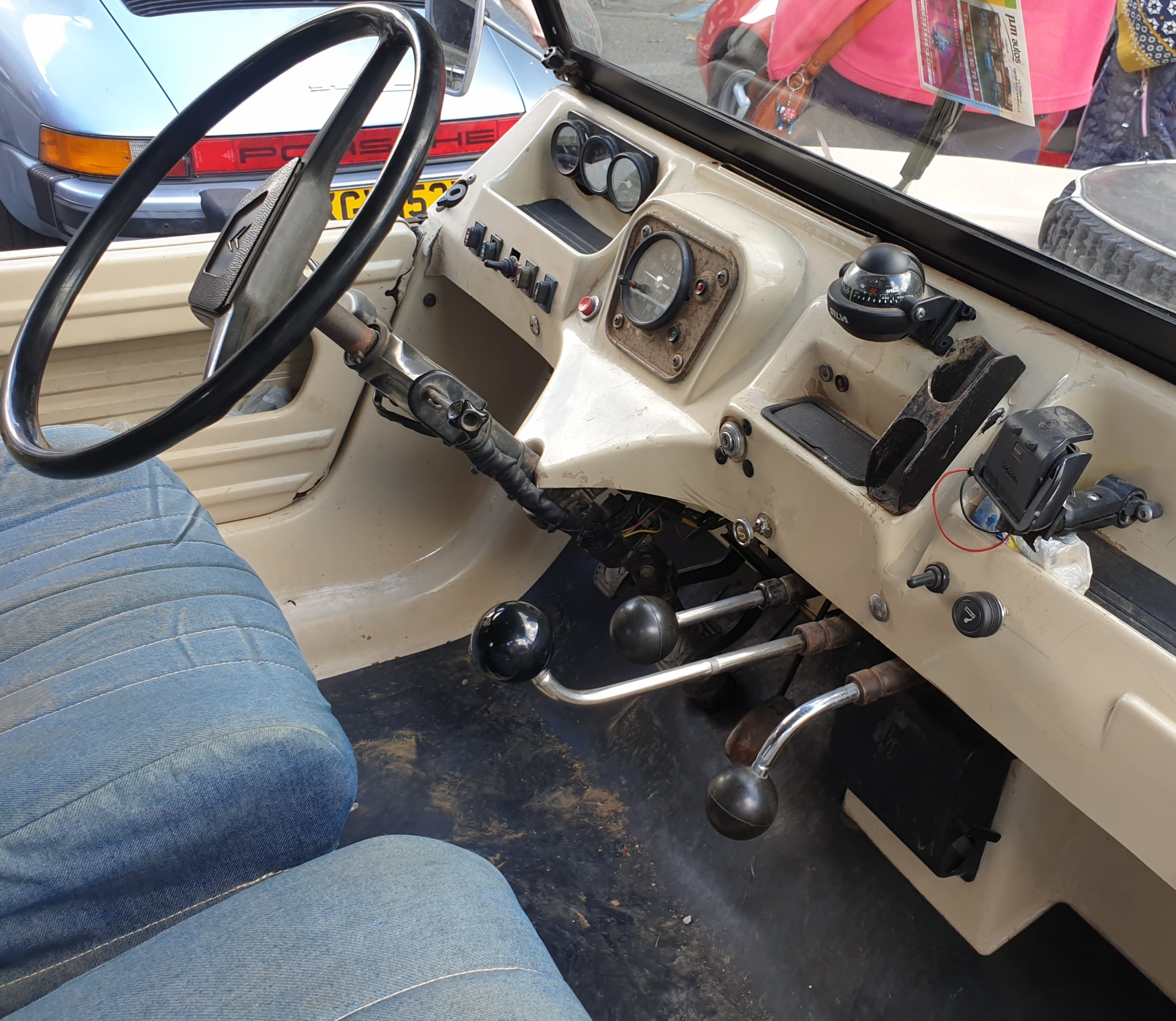 Citroën Méhari 4 × 4. Commandes de transmission : boîte principale, quatre roues motrices, rapports courts.